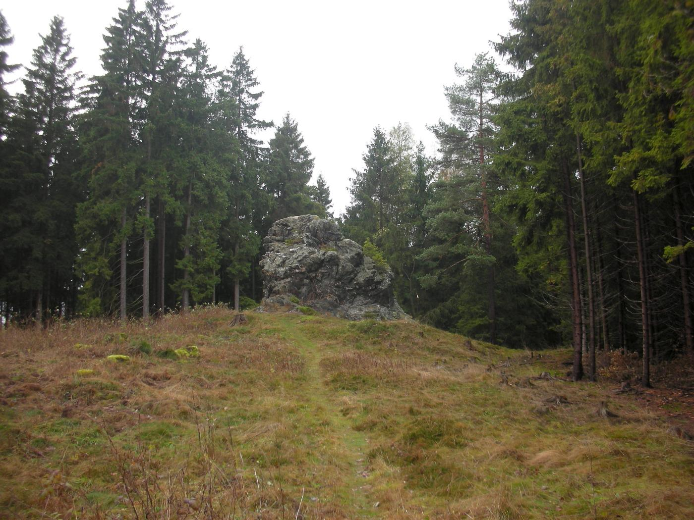 Hoher Stein bei Bad Elster (Vogtland)